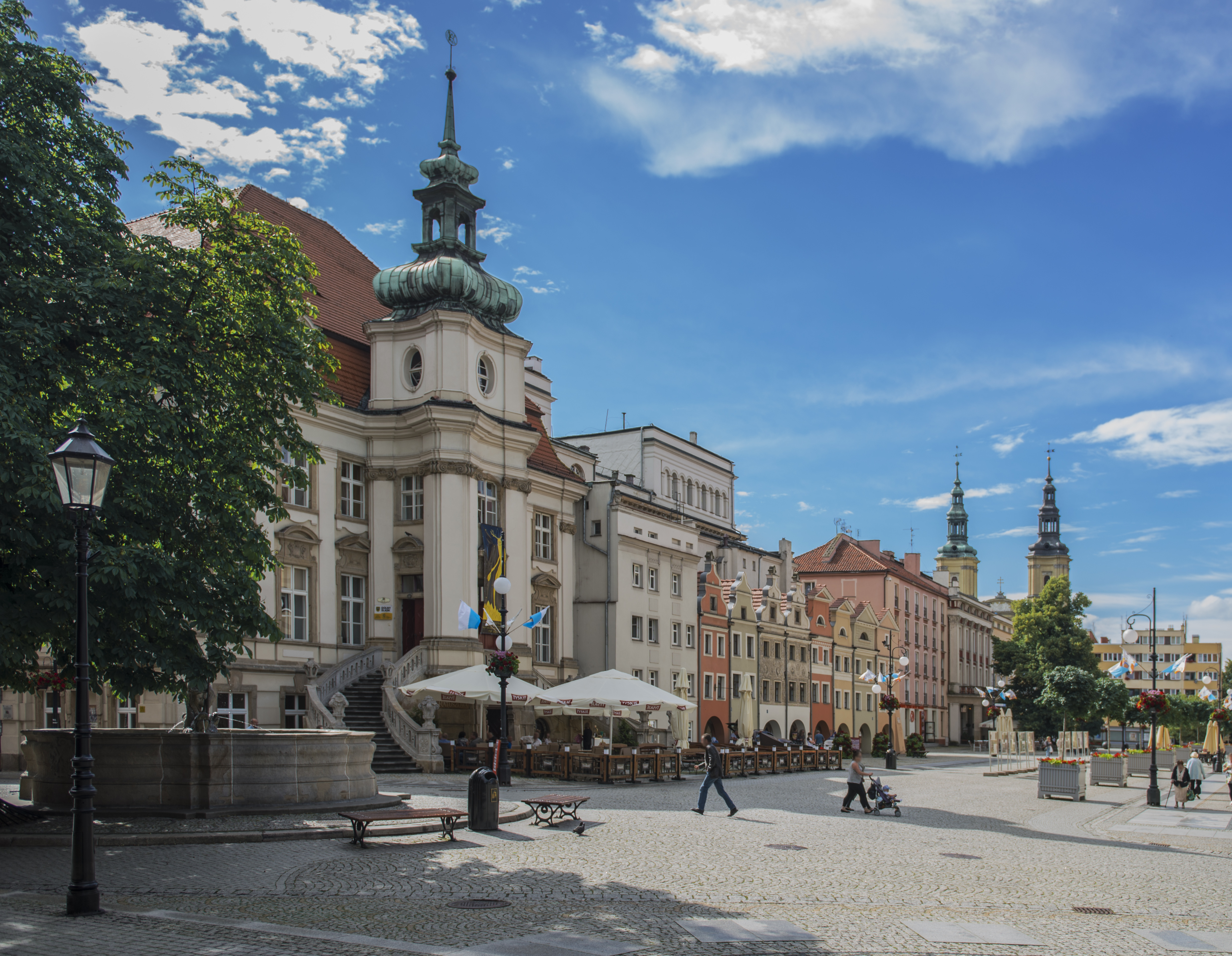 Stary Ratusz na legnickim rynku